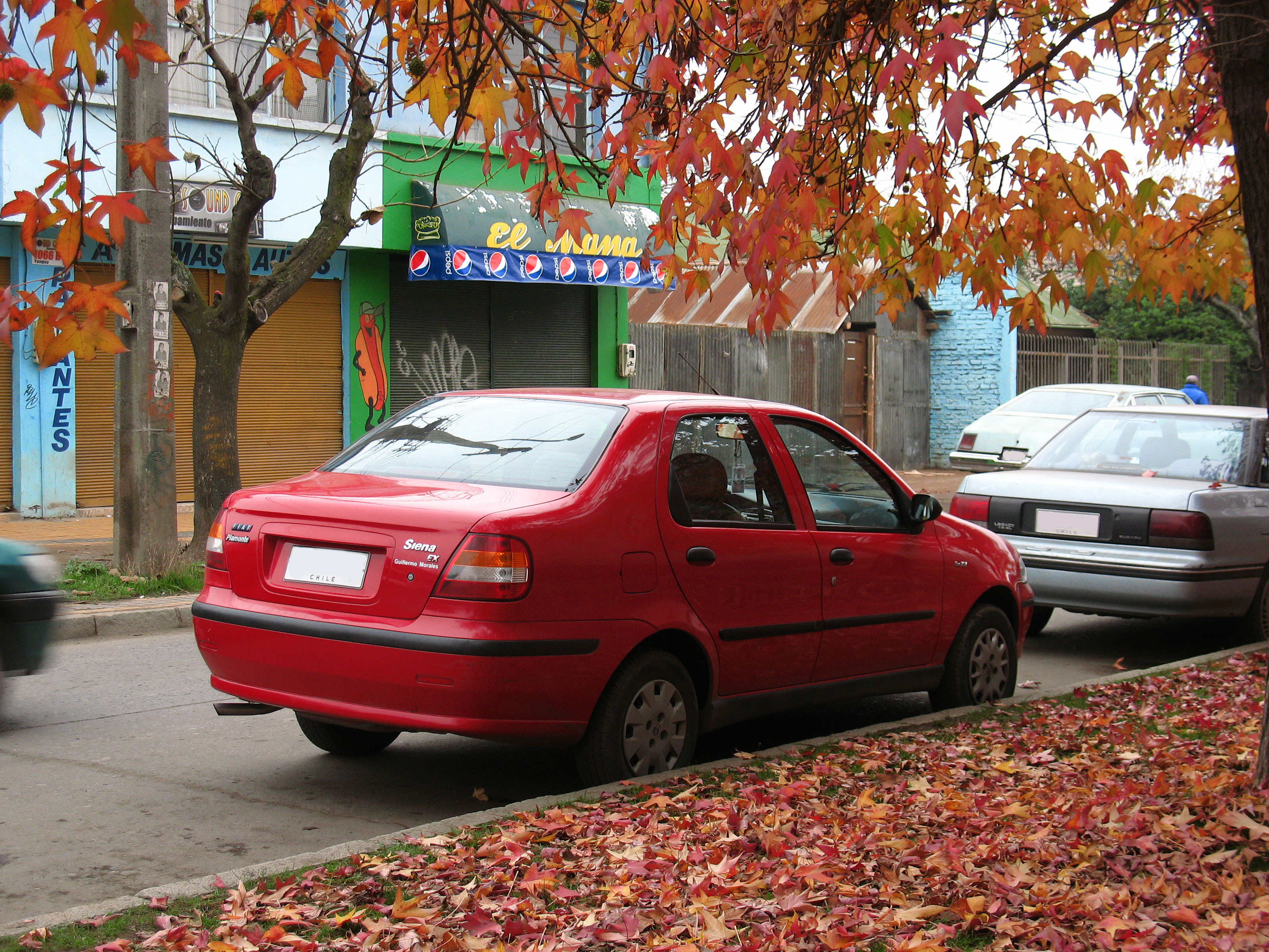 Fiat Siena EX 1.4 Fire 2004